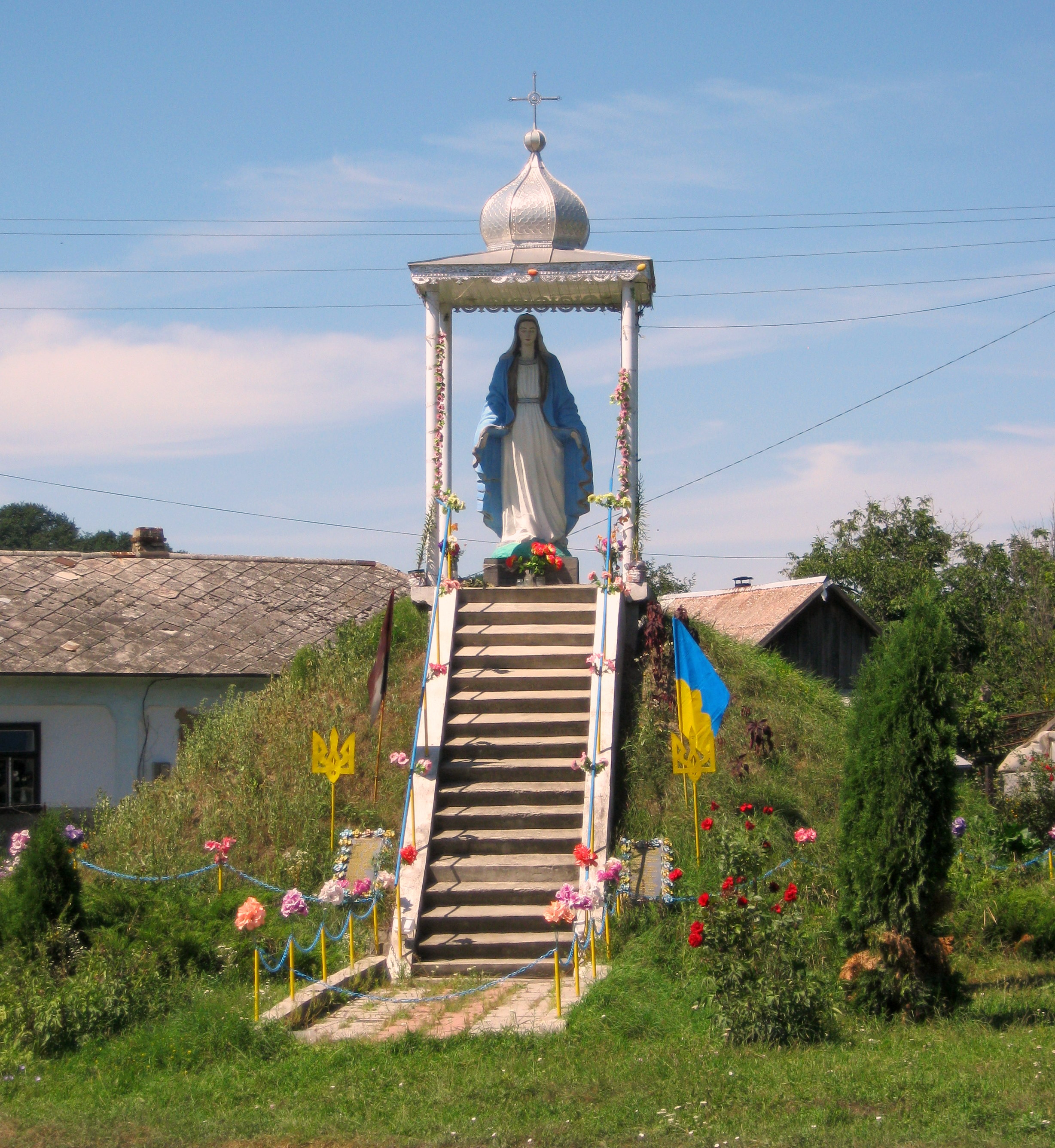 Пам'ятник на честь Богородиці у селі Устя Борщівського району Тернопільської області